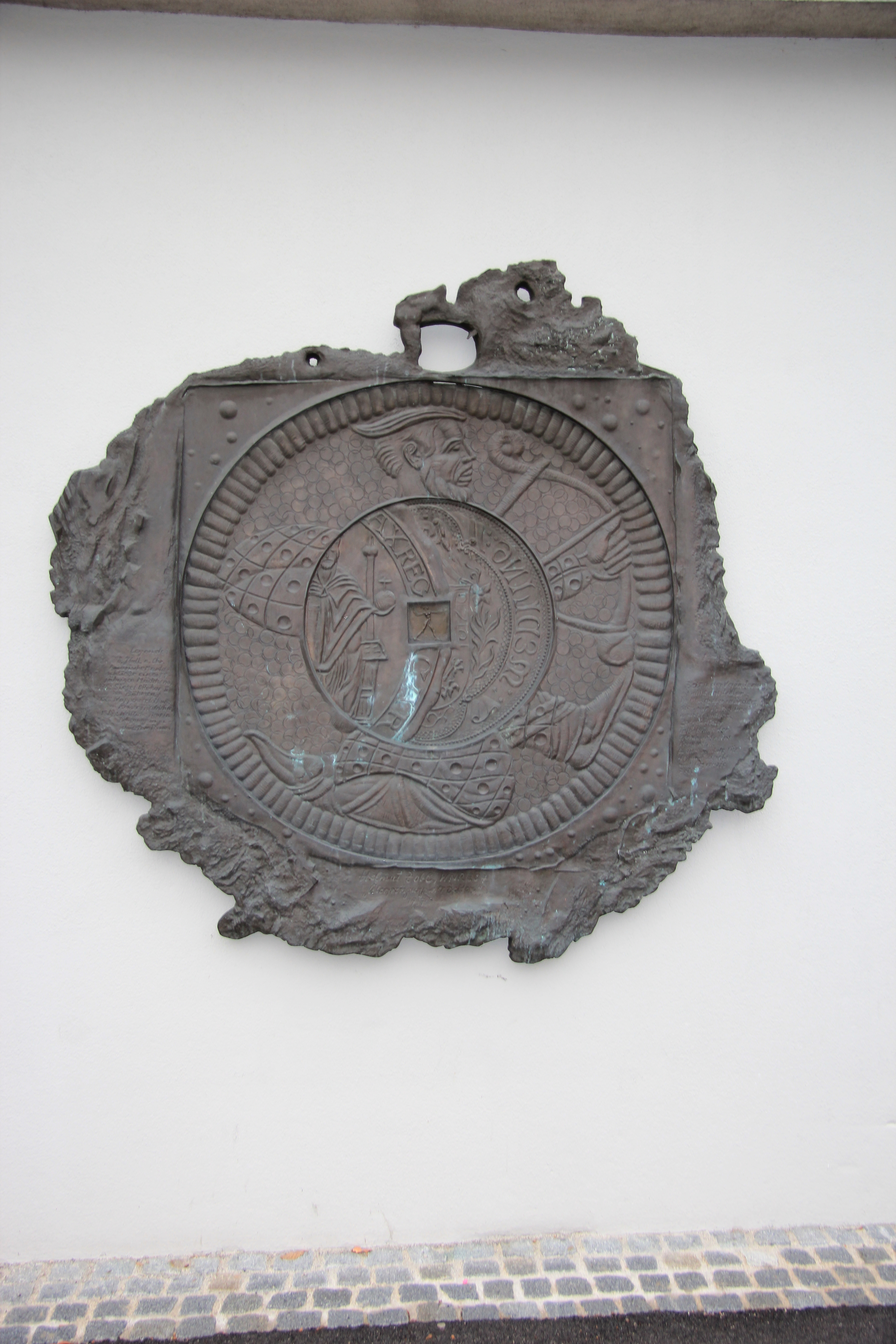 "Überprägung der Zeiten" von Helmut Zobl in Mödling, Niederösterreich